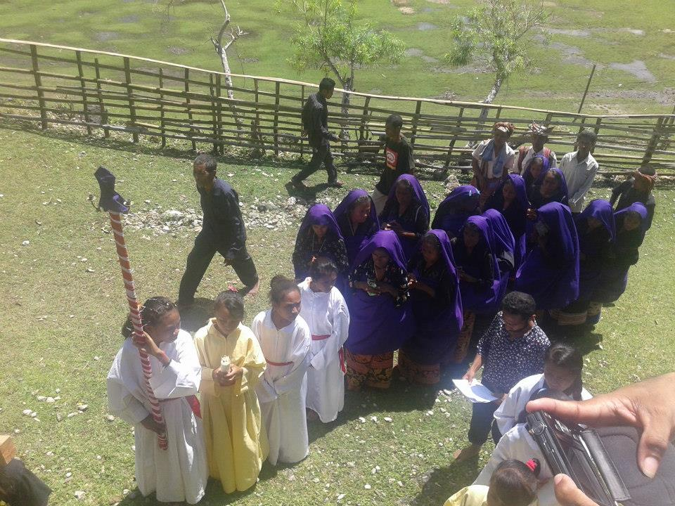 Leohito